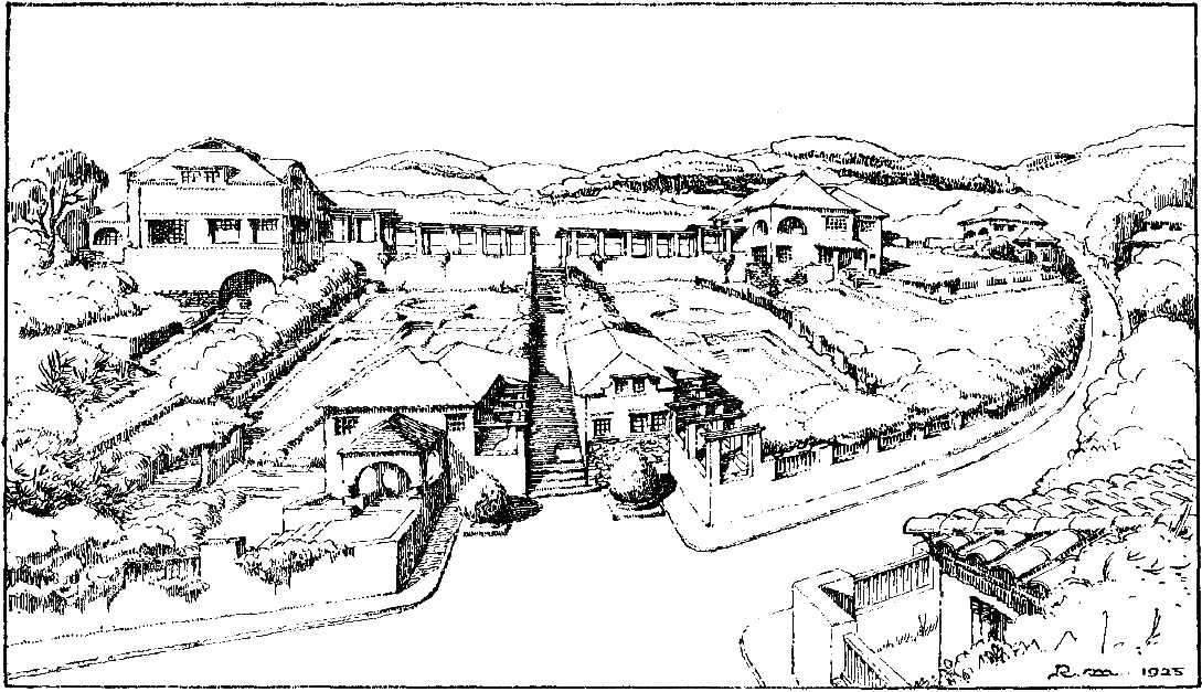 Perspectiva firmada por Rafael Masó de una parte de la Urbanización de S'Agaró, obra del mismo arquitecto. Se trata de los dibujos previos a la construcción.